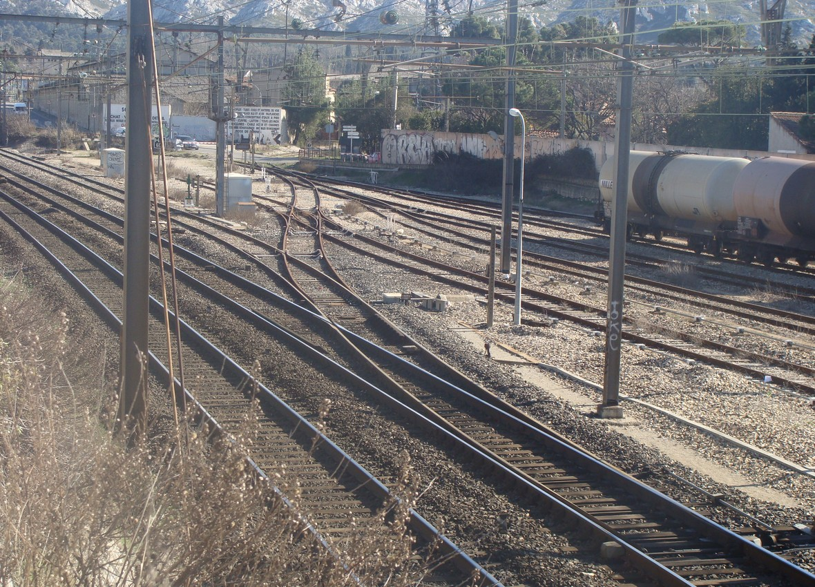 Le débranchement de la ligne départementale en direction de Marignane, à la sortie sud de la gare de Pas-des-Lanciers.